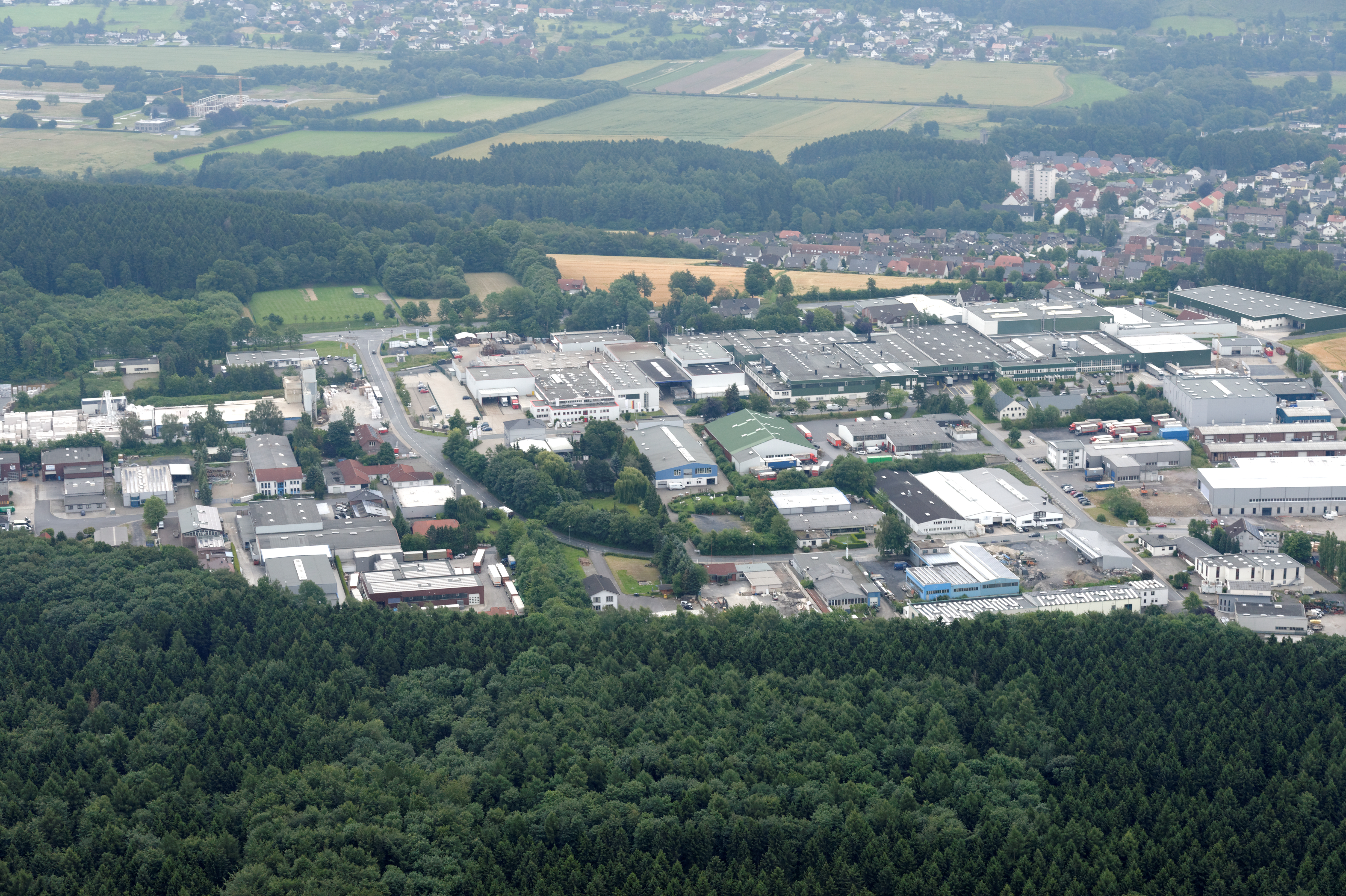 Fotoflug Sauerland-Nord. Wickede (Ruhr): Industriegebiet Westerhaar. The making of this document was supported by the Community-Budget of Wikimedia Germany.